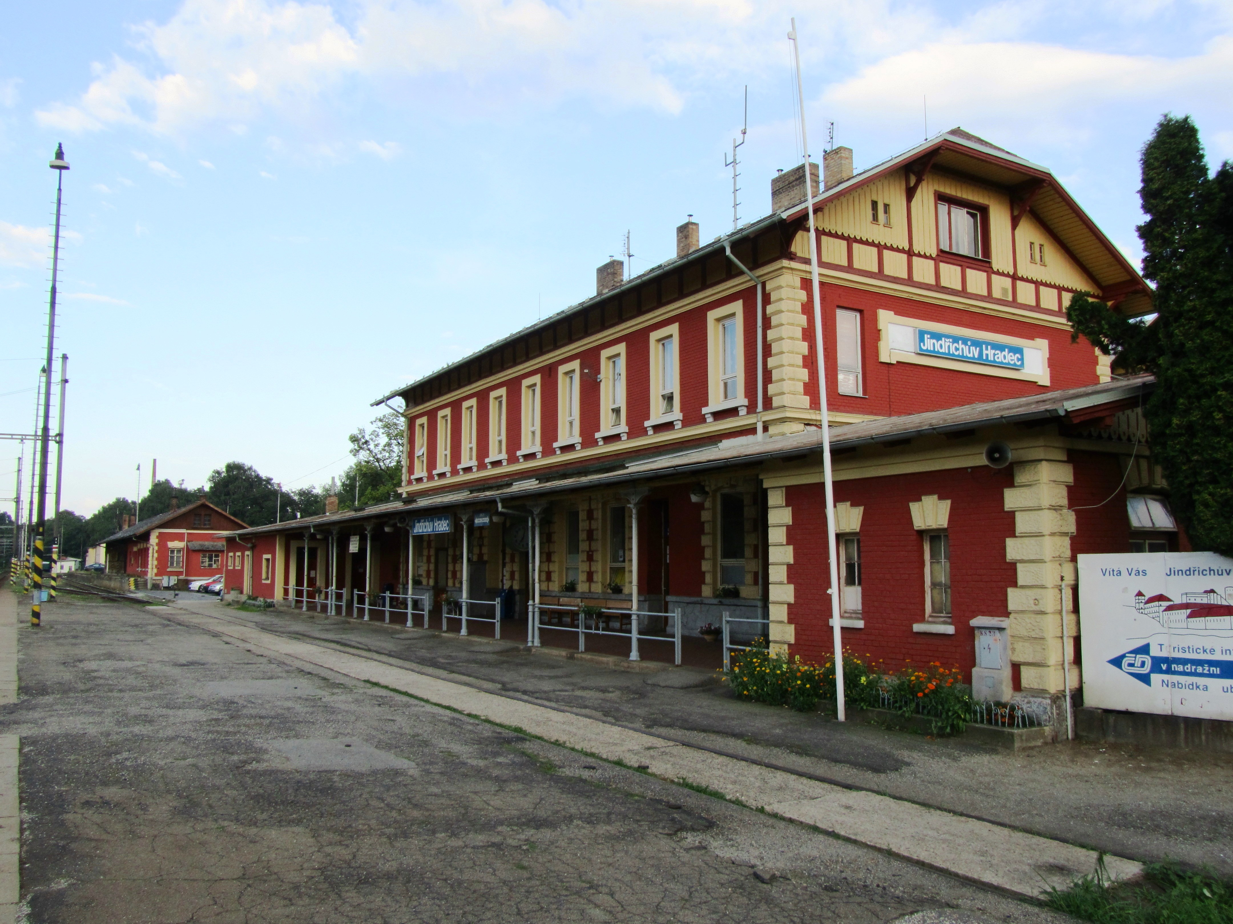 Železniční stanice (Jindřichův Hradec), Jindřichův Hradec 193